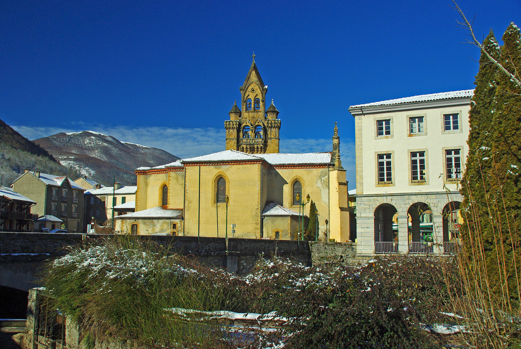 Église Saint-Étienne de Seix (Ariège, France), côté est.